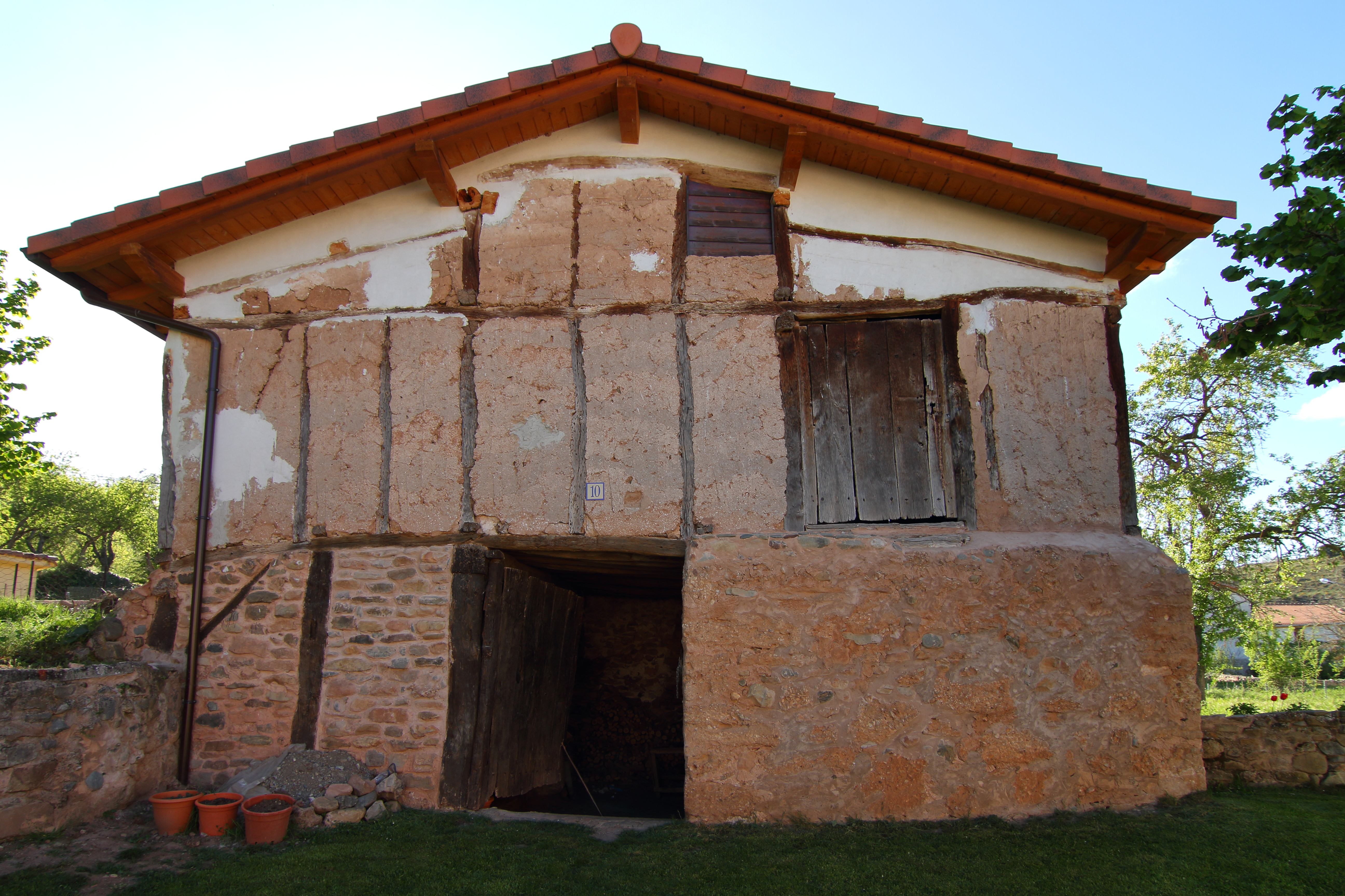 Villagalijo, casa de adobe